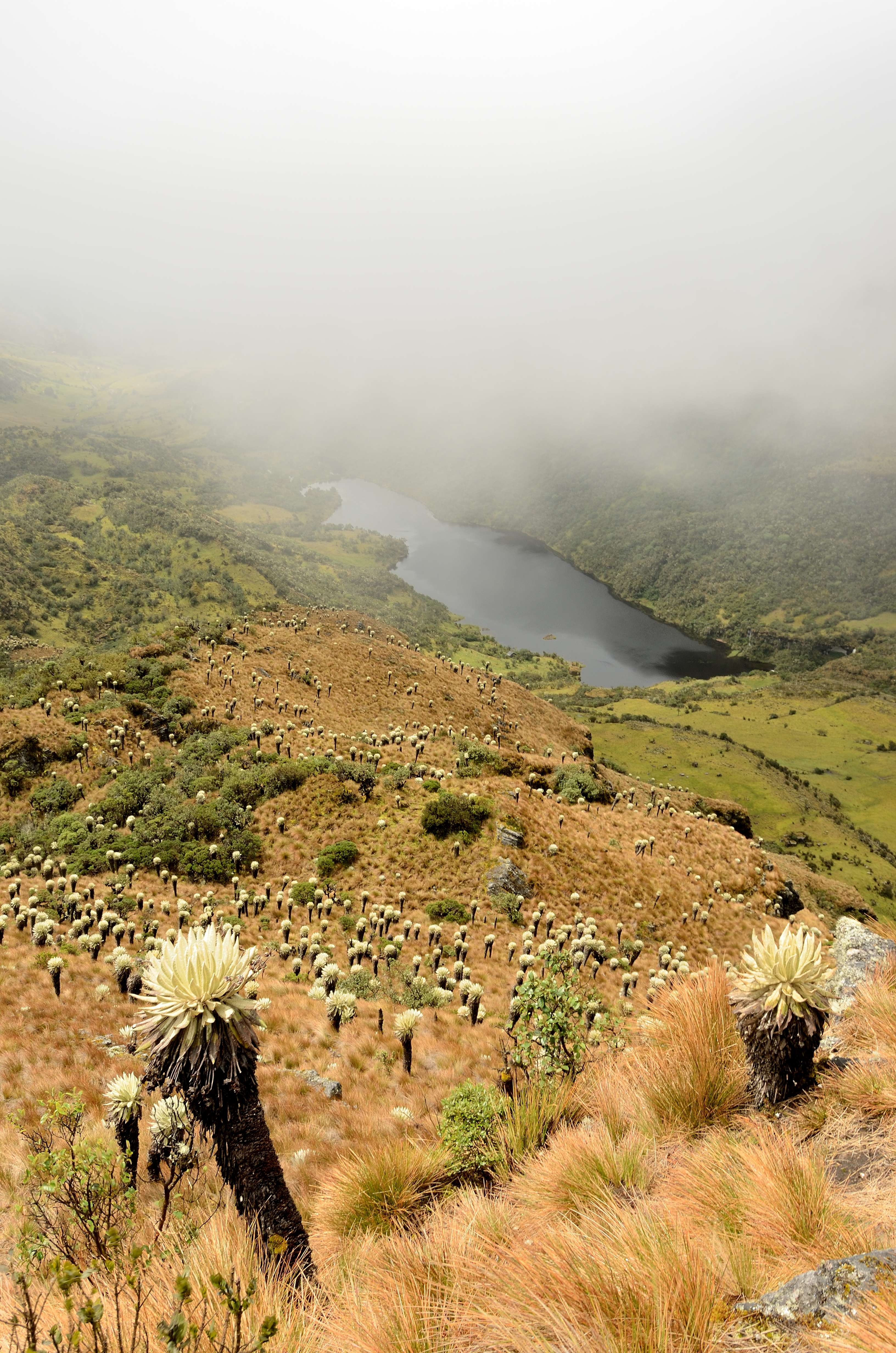 Paramo de Ocetá - Colombia 2012